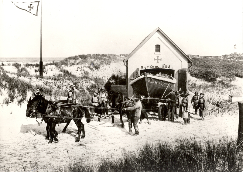 Alte Ansicht der DGzRS Rettungsstation auf Borkum